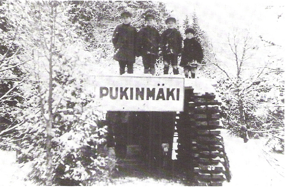 Pukinmäen suomalaisten teettämä rautatieaseman kyltti, joka myöhemmin siirrettiin Laitakarin korjaamon katolle.